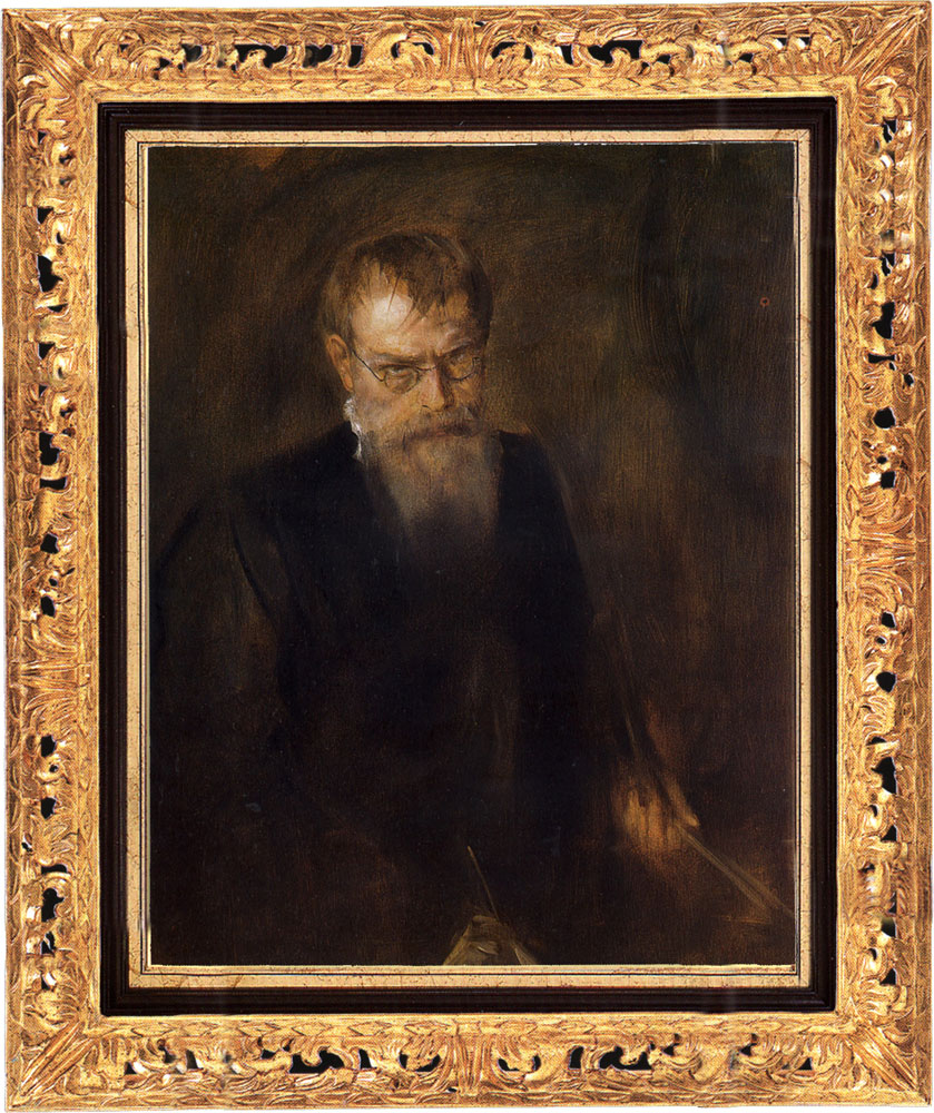 aus dem Nachlass der Tochter Gabriele Neven du Mont, geb. Lenbach, ehemals Wallraff-Richartz-Museum, heute in Privatbesitz